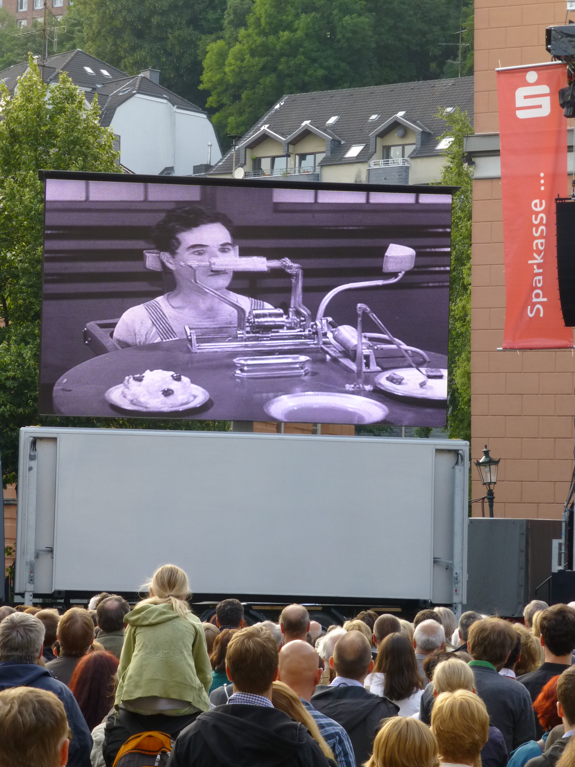 Open-Air-Konzert des Sinfonieorchester Wuppertal am 12. Juli 2013 ab 20:00 auf dem Laurentiusplatz, Wuppertal. Geboten wurde Stummfilm & Livemusik, Charlie Chaplin: "Modern Times"